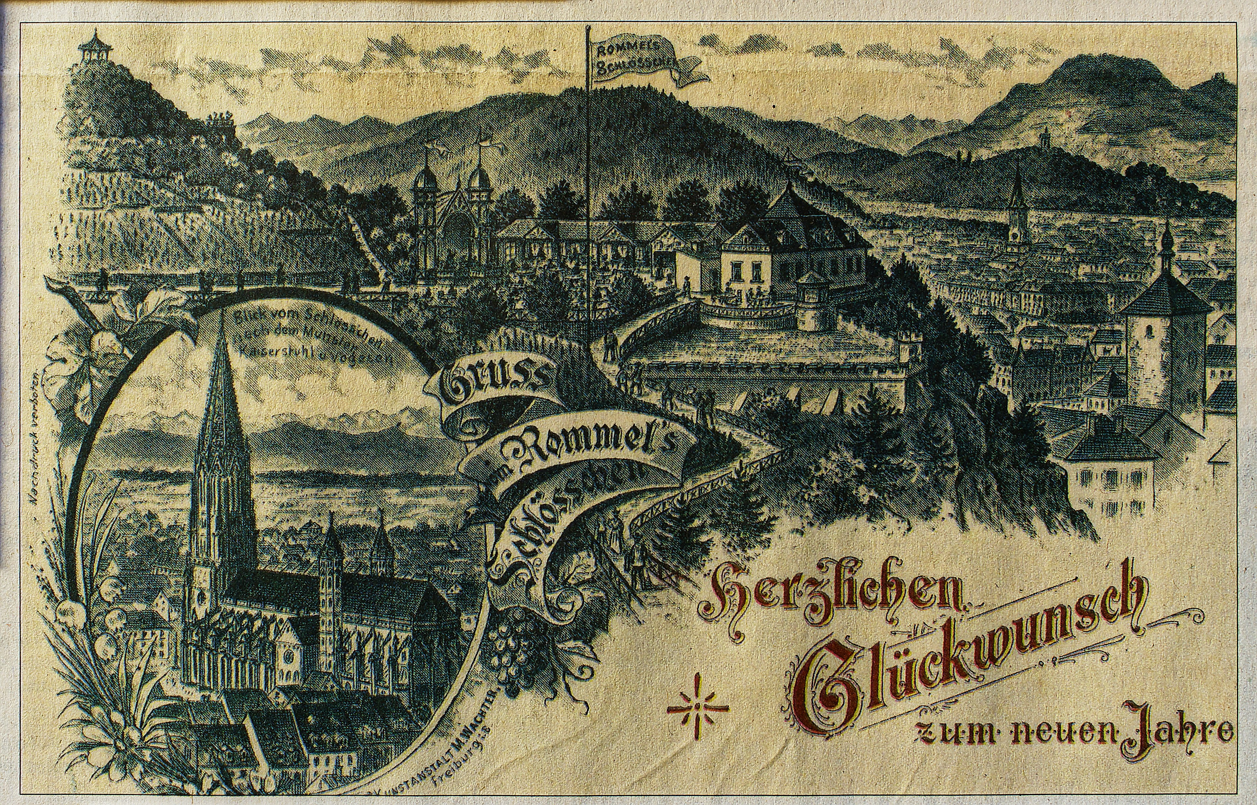 Blick auf das Greiffeneggschlößchen in Freiburg